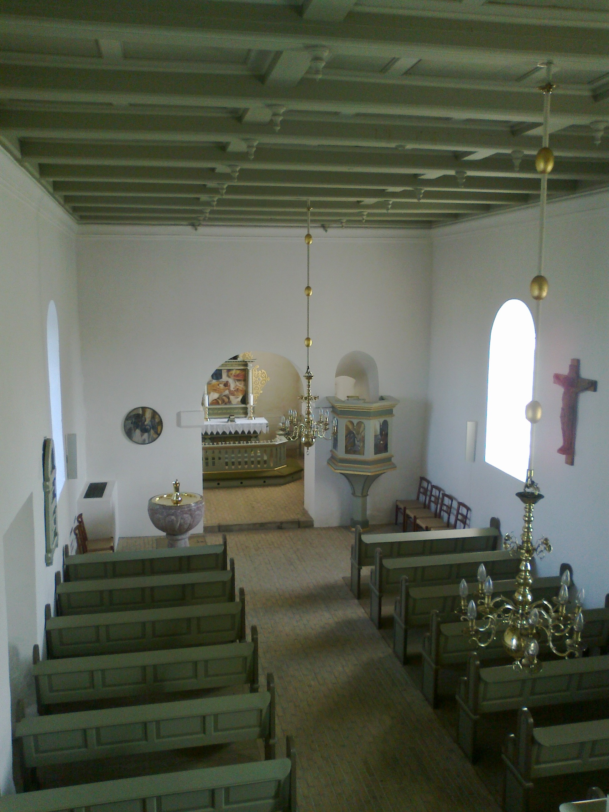 Kirkerummet/kirkeskibet i Over Hadsten Kirke.